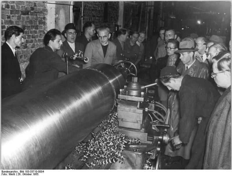 Zentralbild-Weiß Zi-Ge 4Motive 28.10.1955 Neuerer der Republik helfen Berlinern Drehern Am 26. Oktober 1955 führten die Oberingeneure Friedrich Niekels und Kurt Marx aus Leipzig im VEB "7.Oktober";Berlin; das von ihnen entwickelte Sprühkühlverfahren vor. Die Kollegen Nieckels und Marx brachten zur Vorführung ihres Verfahrens einen Apparat mit, der bereits vom VEB "MEWA",Plauen, serienmäßig hergestellt wird. Dieses Verfahren kann beim Drehen, Fräsen, Bohren und Schleifen angewandt werden. Bisher wurdebeim zerspanen ein konzentrierter Strahler einer Emusion eingespritzt, der lediglich die Späne kühlte. Bei dem Sprühkühlverfahren wird diese Emulsion durch Preßluft zu einem feinem Nebel zerstäubt und von unten gegen den Drehstrahl geführt. Daraus ergibt sich eine bessere Kühlung bei der Arbeit mit spanabhebenden Werkzeugen. UBz: Beim Vorführendes neuen Verfahrens im Großdrehmaschinenbau "7.Oktober".